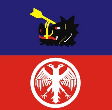 Flag of Velika Plana, Serbia/Drapeau de la ville de Velika Plana, Serbie